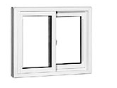 کشویی